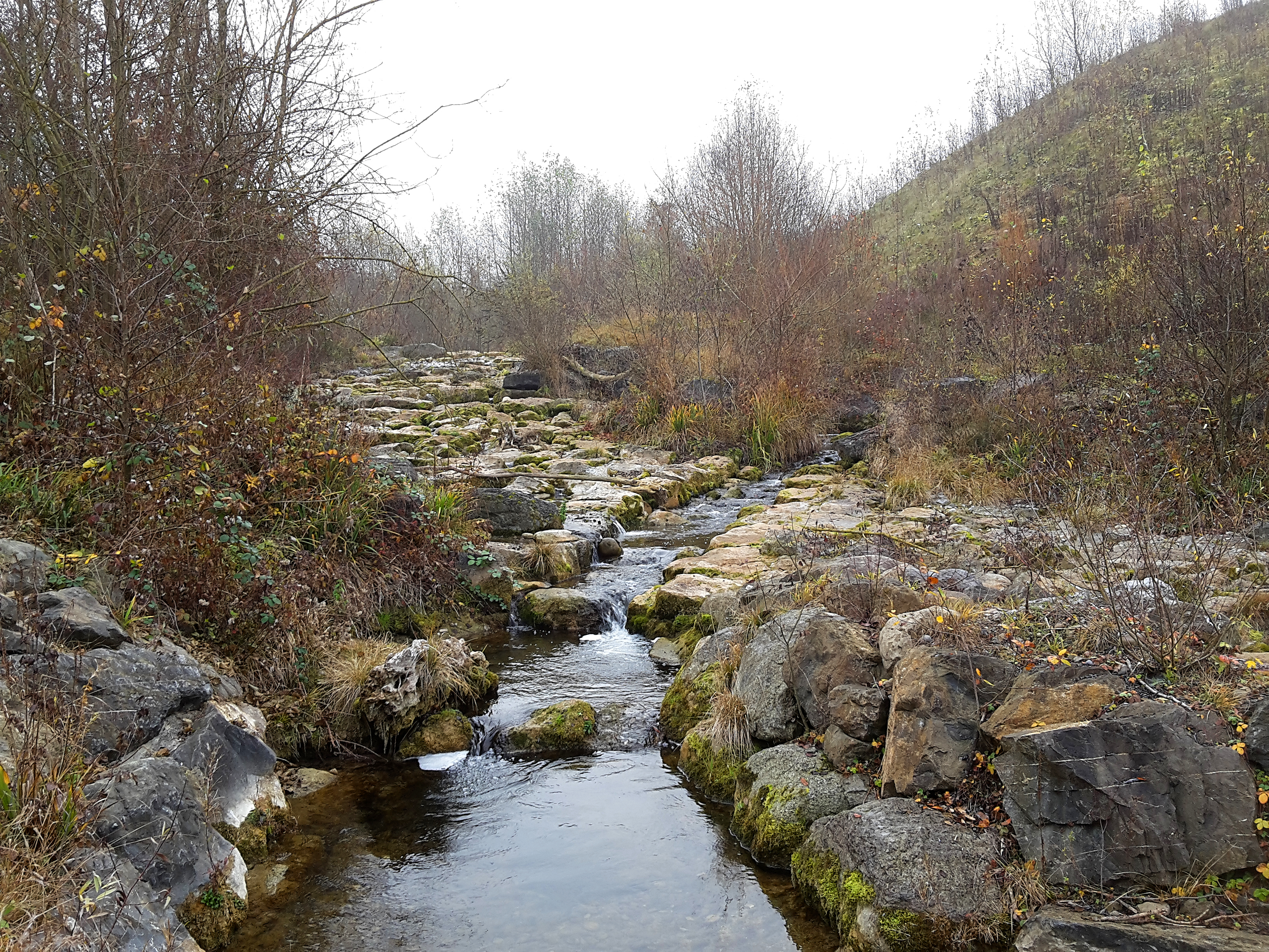 Die Reppisch bei Landikon (Birmensdorf) direkt auf der Gemeindegrenze zu Stallikon bei der Einmündung des Bättelweidbachs. Blick flussaufwärts in Richtung Sellenbüren (Stallikon).